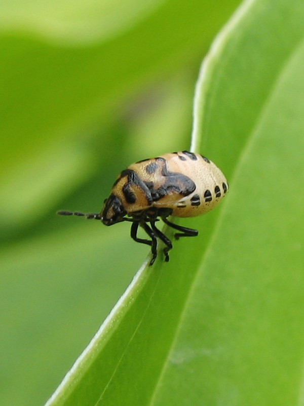 Cosmopepla lintneriana, Stink bug nymph -- nymphe de punaise North American insect (order Hemiptera) Insecte nord-américain (ordre des hémiptères) Bas Saint-Laurent -- Province de Québec -- Canada 1157-2006 Canon PowerShot A620 2006-08-02